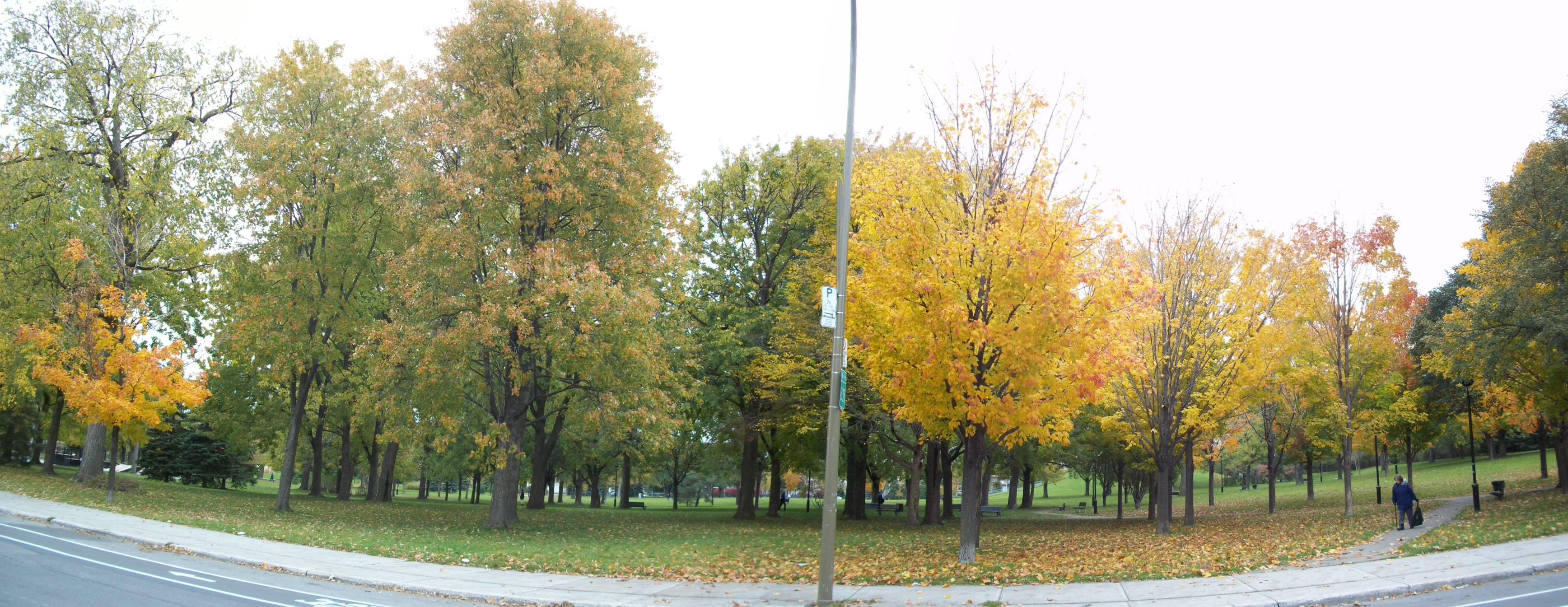 Parc Ahuntsic, vu de la rue Lajeunesse, à l'automne, à Montréal